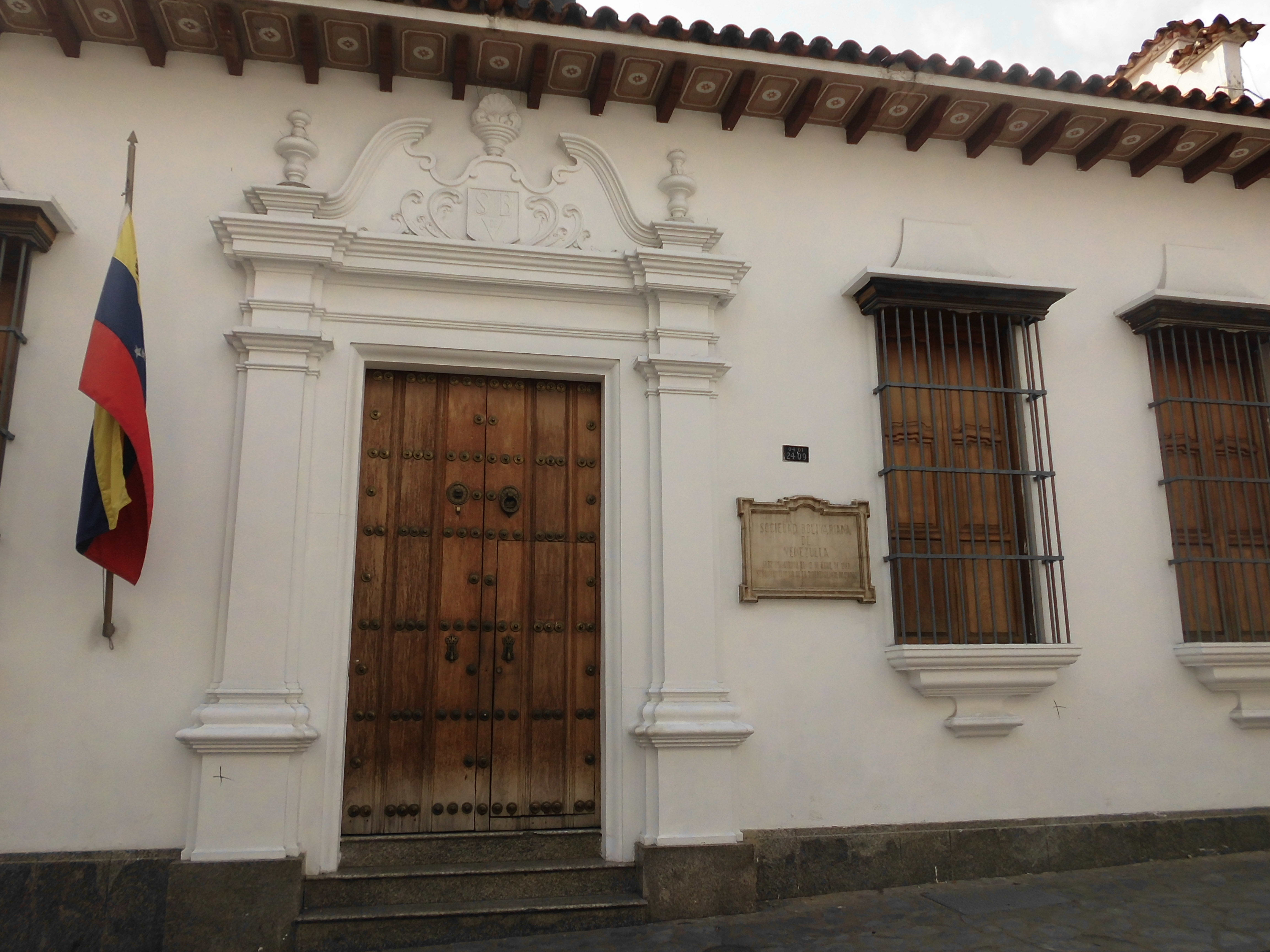 Puerta Principal de la Sociedad Bolivariana y su lado derecho